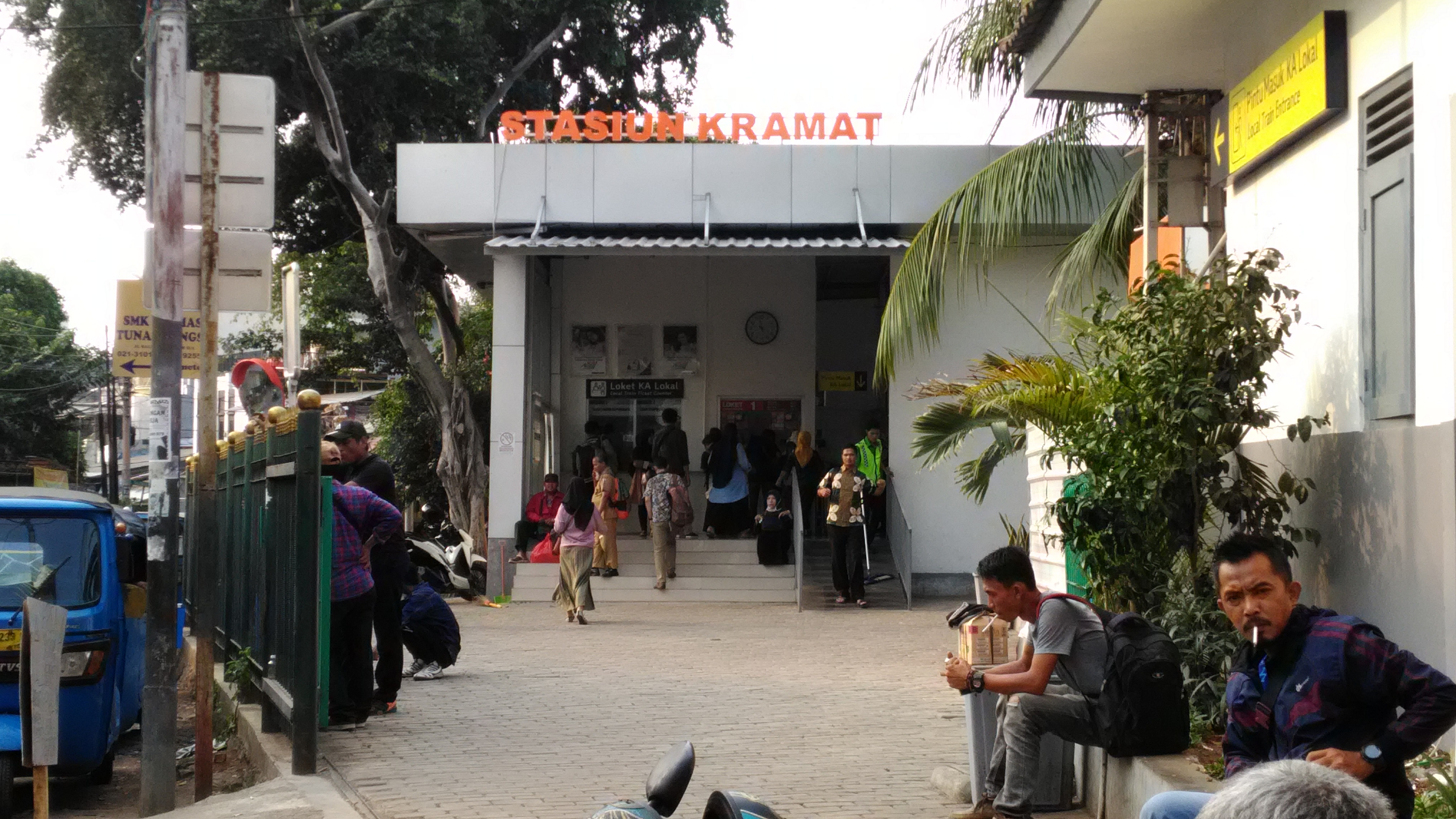 Sunda: Stasion Kramat